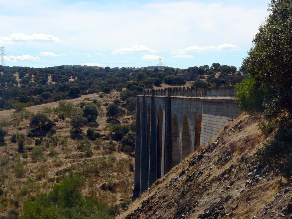 Fotografía de viaducto de la Vía Verde de la Jara. Septiembre 2006.